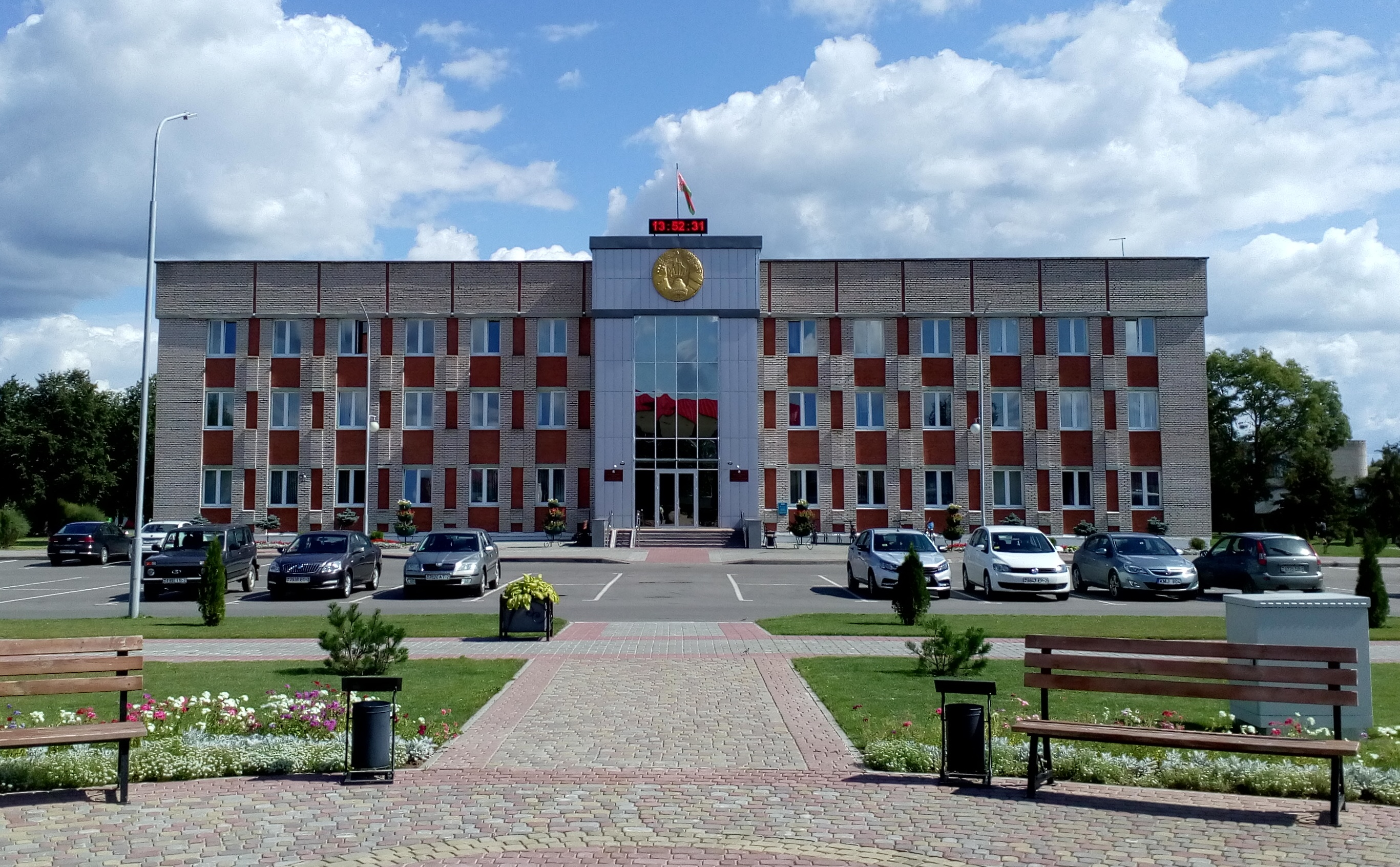 Верхнядзвінскі райсавет і райвыканкам